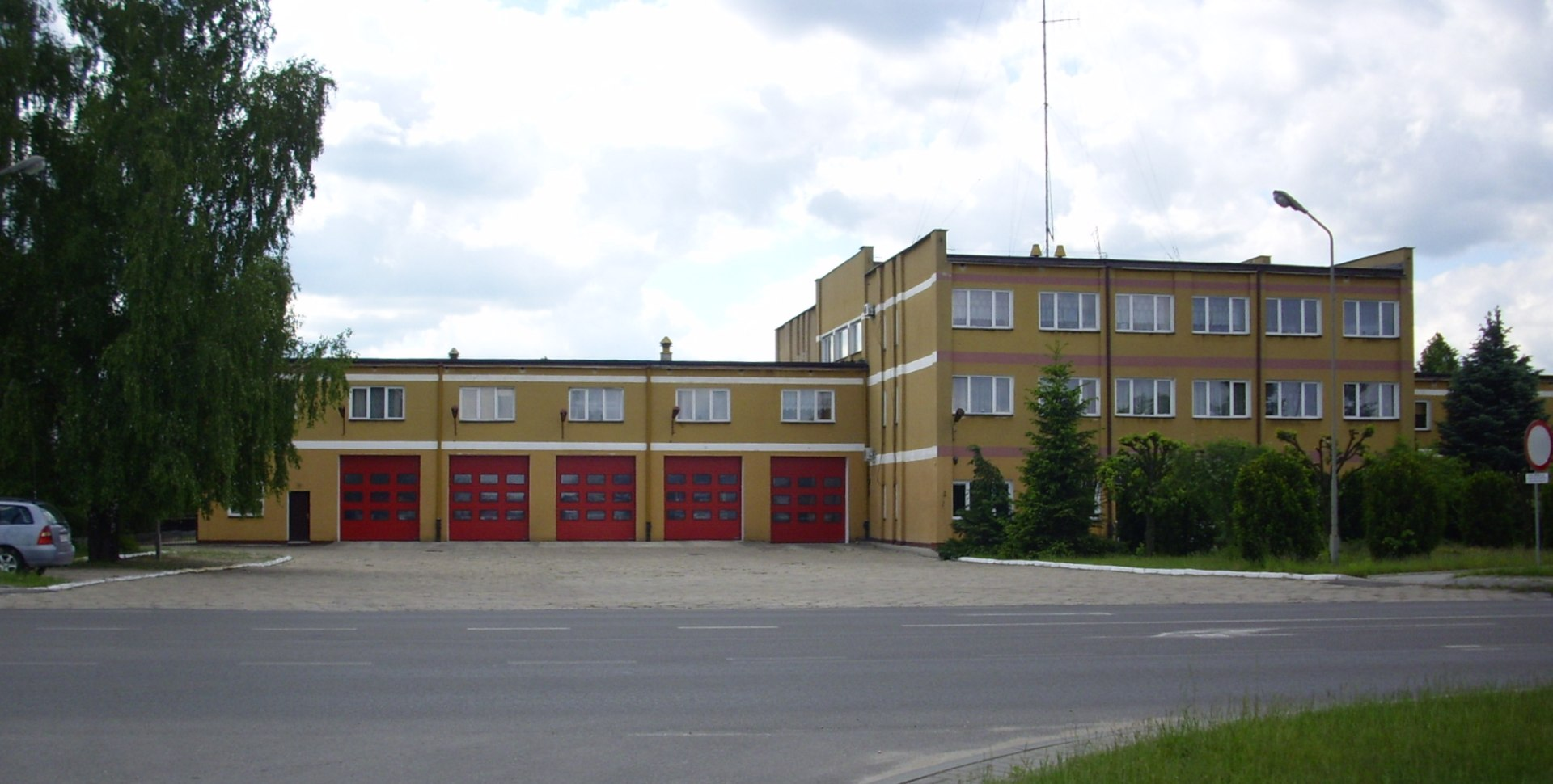 Remiza Państwowej Straży Pożarnej w Białej Podlaskiej przy ul. Sidorskiej.